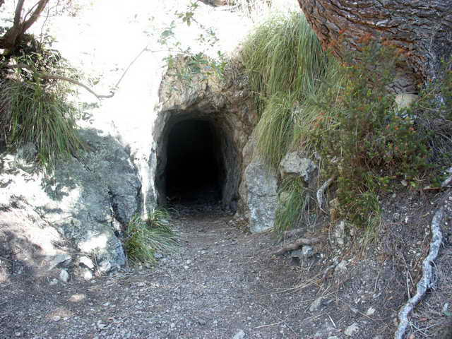 Aven de Son Pou. Mallorca.